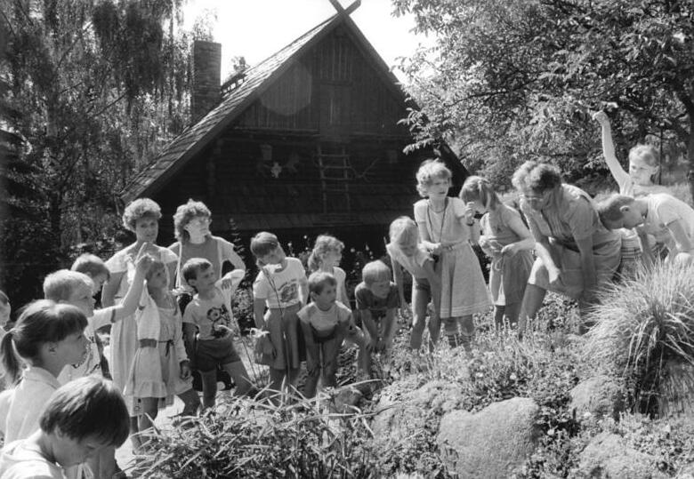 Bad Freienwalde, Haus der Naturpflege, Schülergruppe ADN-ZB Müller-11.8.87 Bez. Frankfurt-Oder: Ferien- Im Haus der Naturpflege in Bad Ferienwalde mit seinem großen Garten werden zur Zeit vor allem Ferienkinder mit Problemen des Naturschutzes und des naturschonenden Gartenbaus bekanntgemacht. Die Pädagogen Helga und Erich Granitzki, Leiter des Hauses, übernehmen diese Aufgabe. Der Gaten wurde vor mehr als 25 Jahren von Kurt Kretschmann, dem Schöpfer des Naturschutzsymbols der DDR, angelegt und seither ständig erweitert. (siehe 15 N)